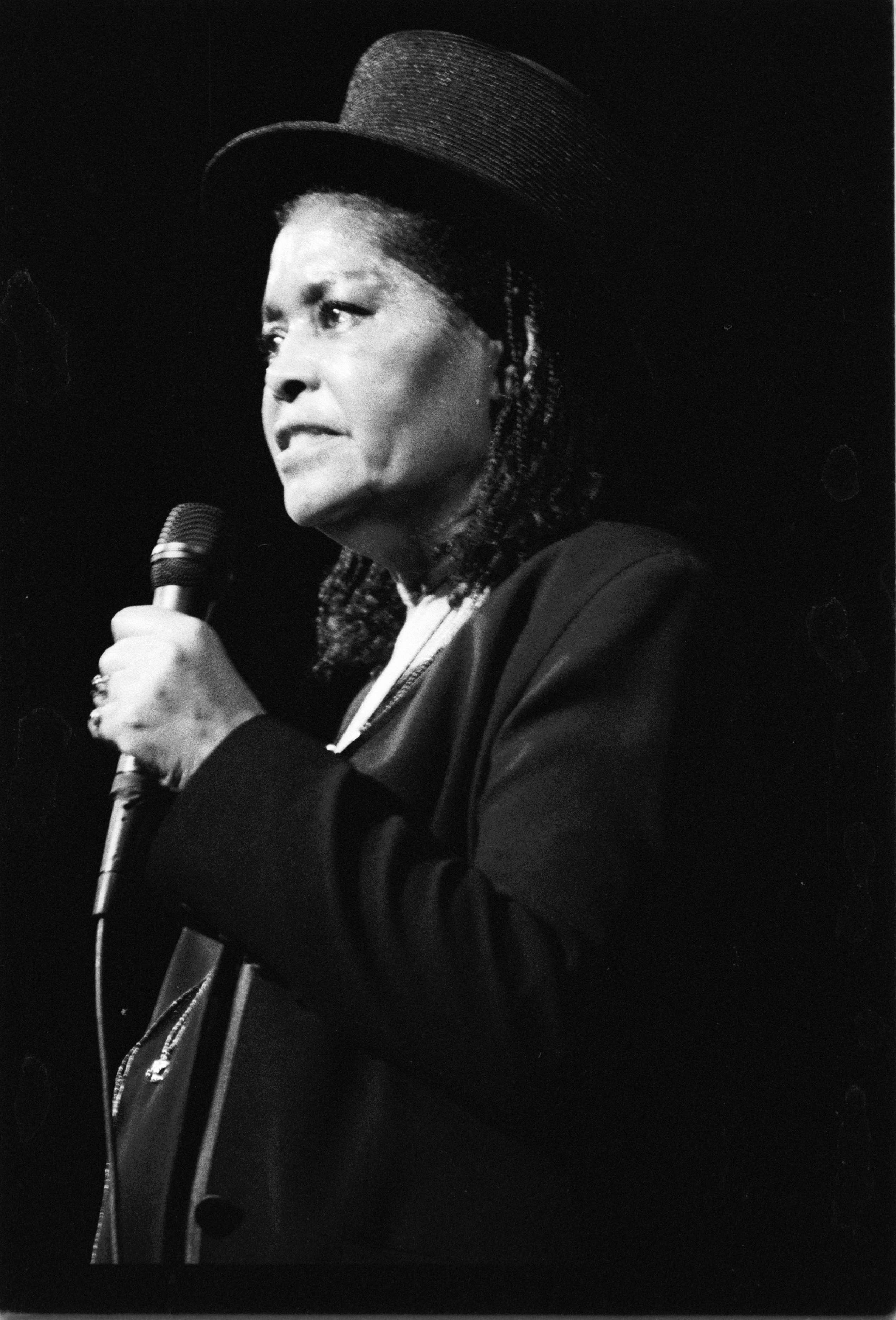 La chanteuse de jazz américaine Abbey Lincoln en concert à Deauville (Normandie, France)